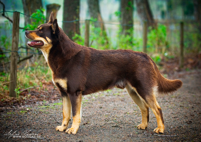 Red & Tan kelpie